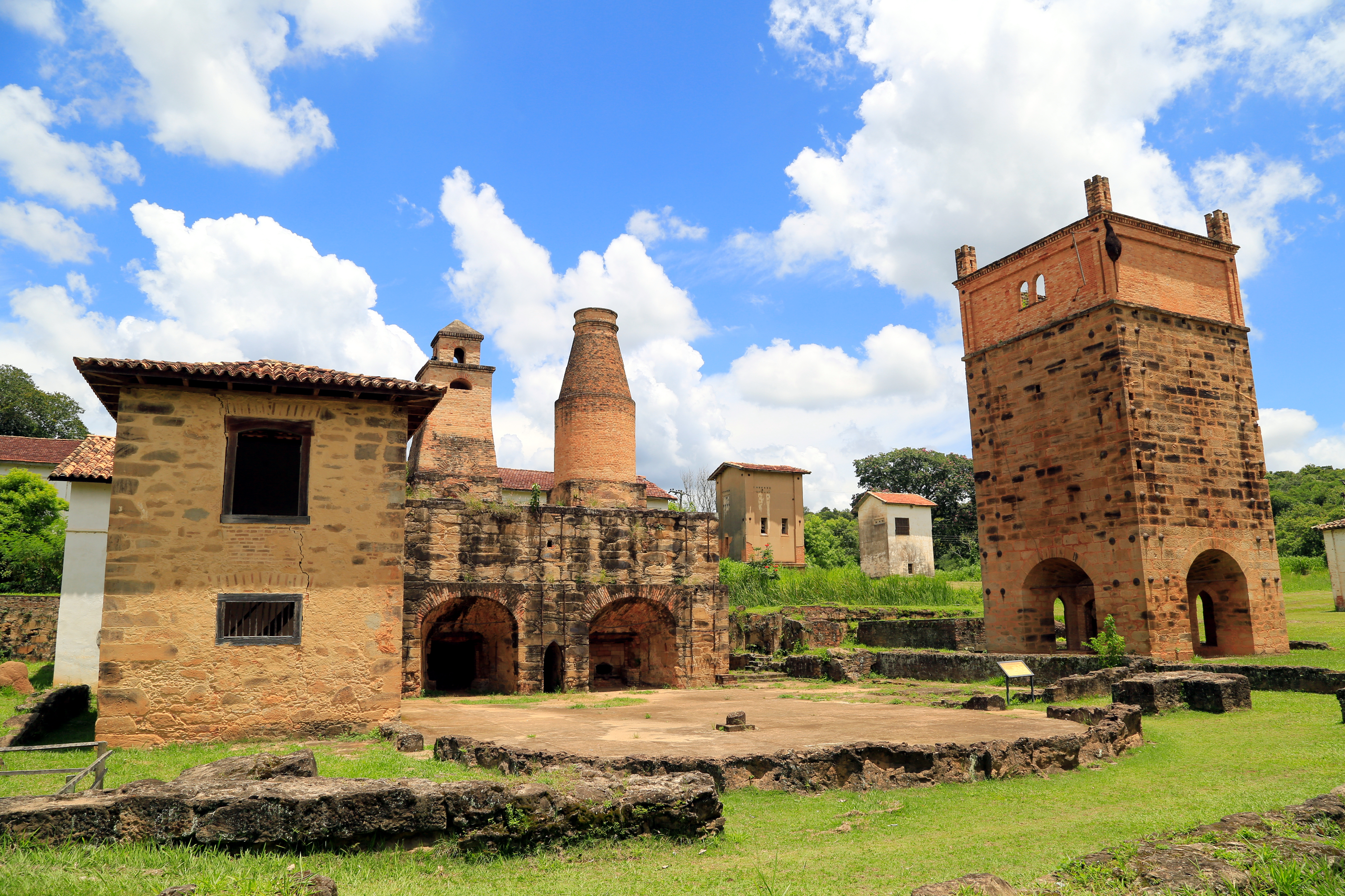 Fornos de fundição da área onde se encontram os remanescentes da Real Fábrica de Ferro de Ipanema